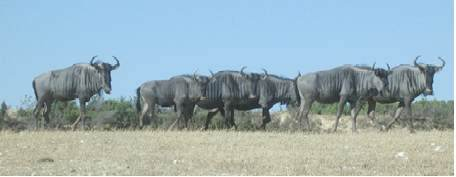 troupeau de gnous